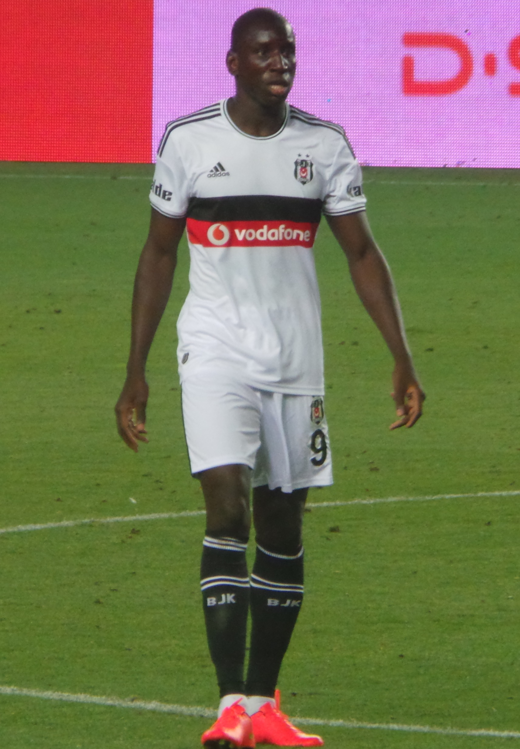 Demba Ba BJK formasıyla SOMA maçında